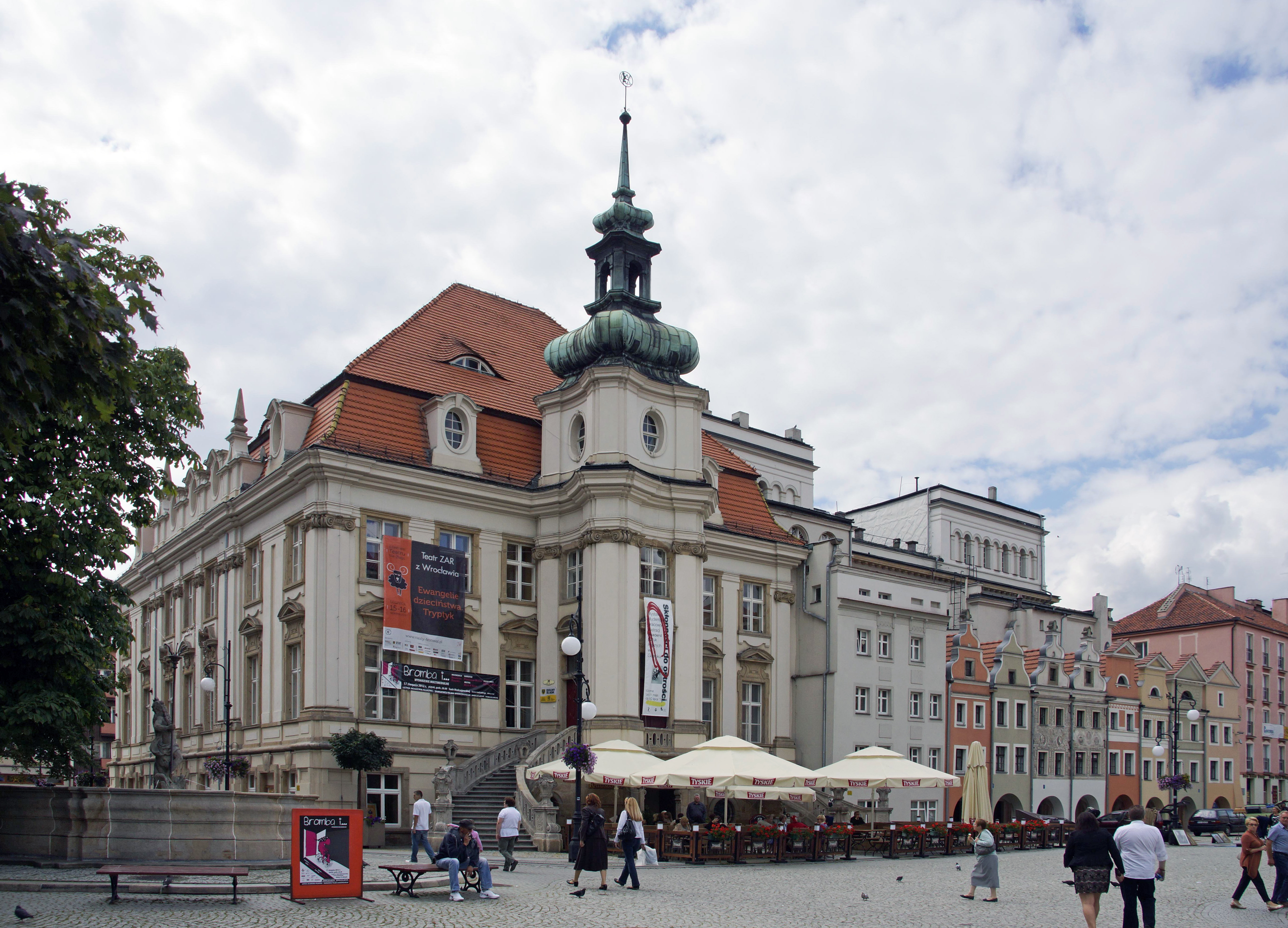 Legnica - dawny ratusz i fragment Rynku